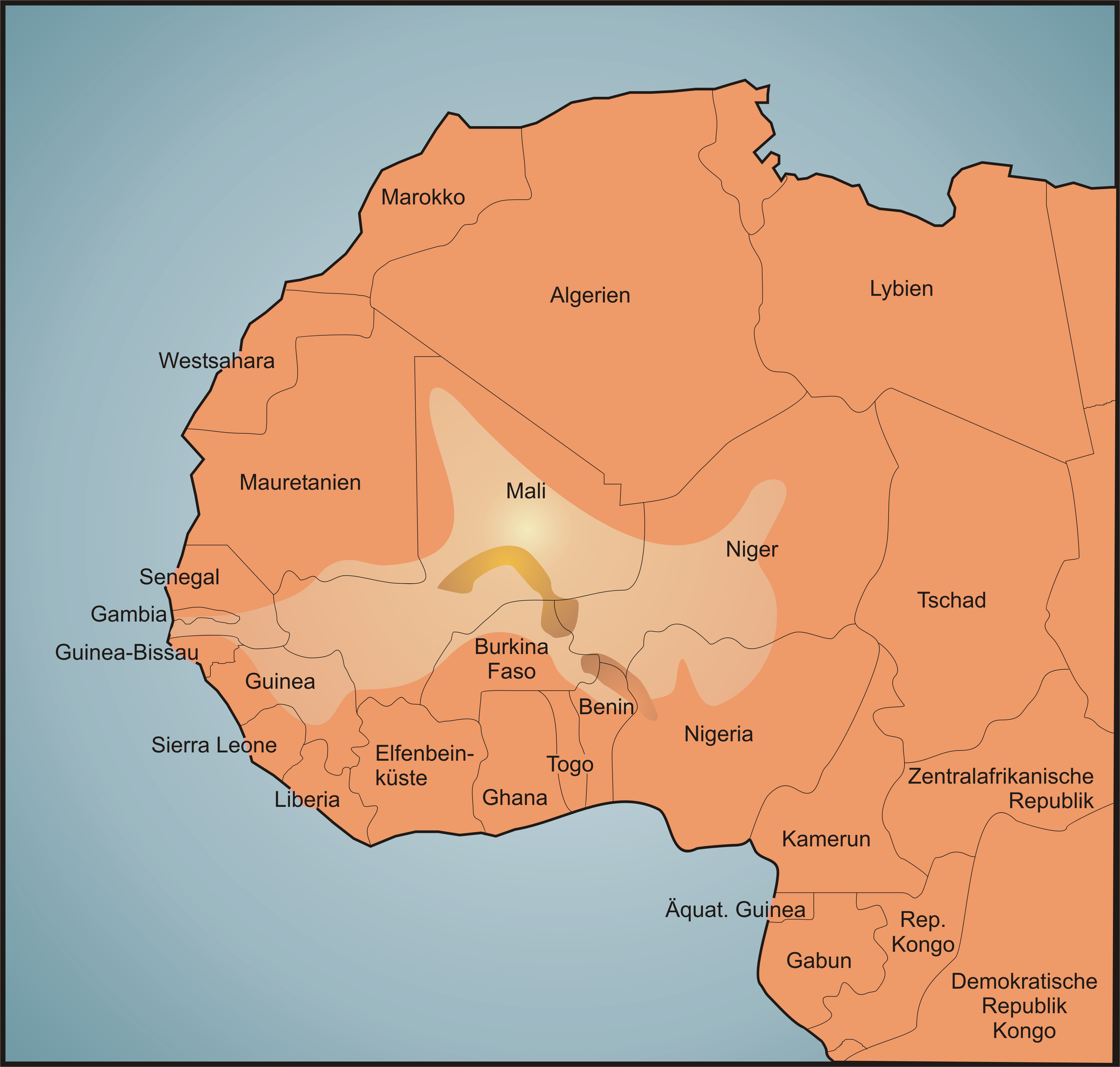 Reich Songhai - selbst erstellt 10/2005 - GNU-FDL